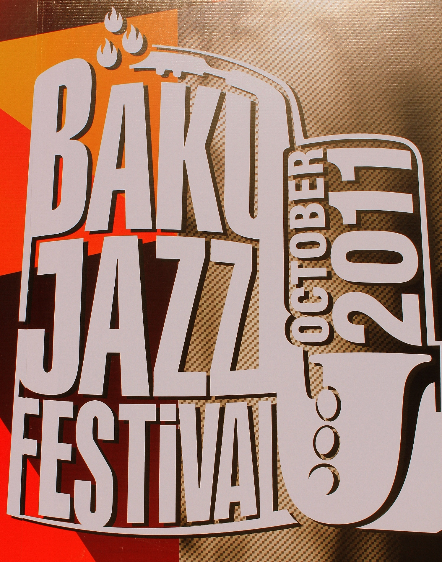 Плакат Джаз фестиваля в Баку